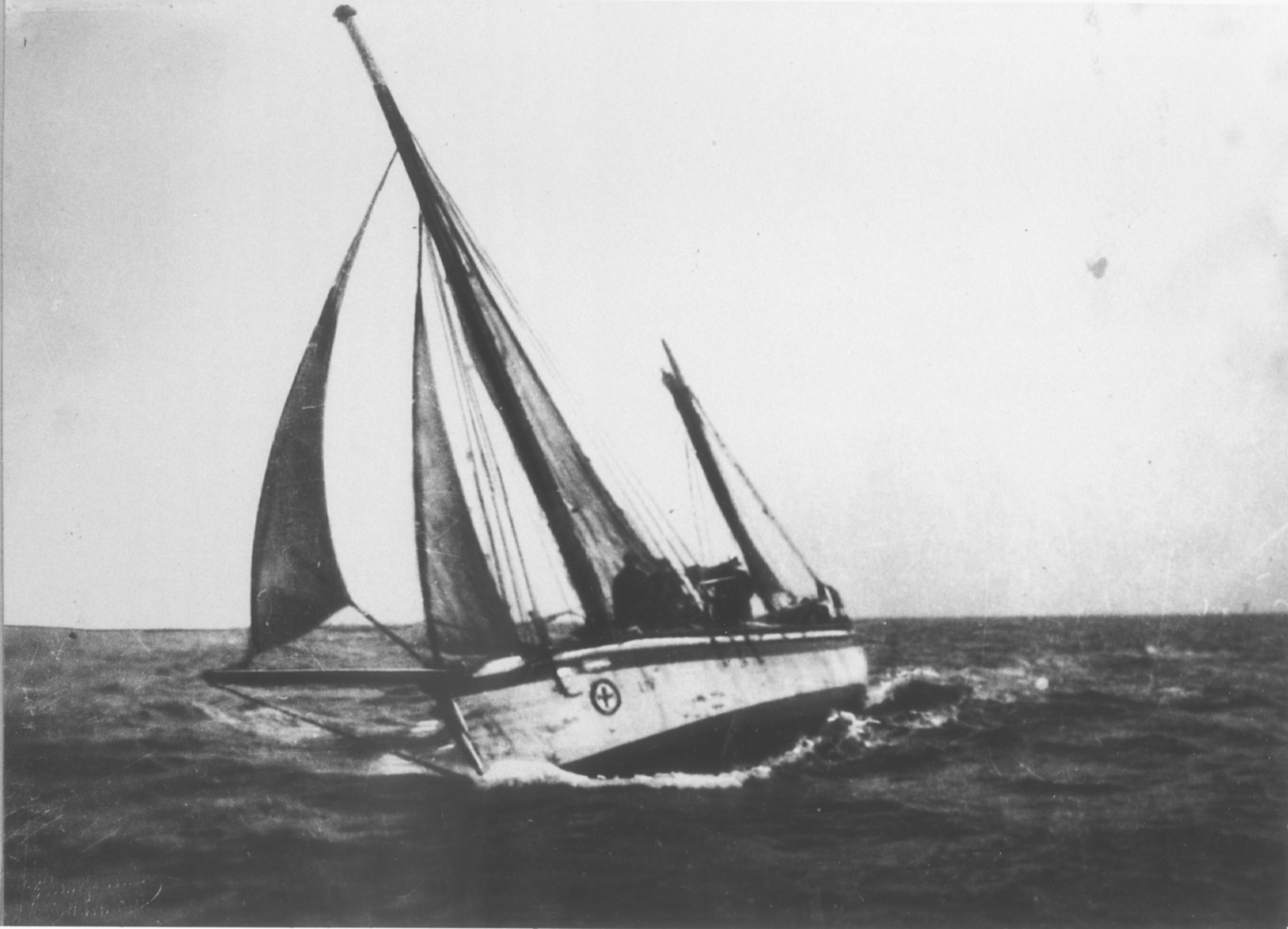 Bilde scannet fra bilde lånt av Unni og Arne Smith.